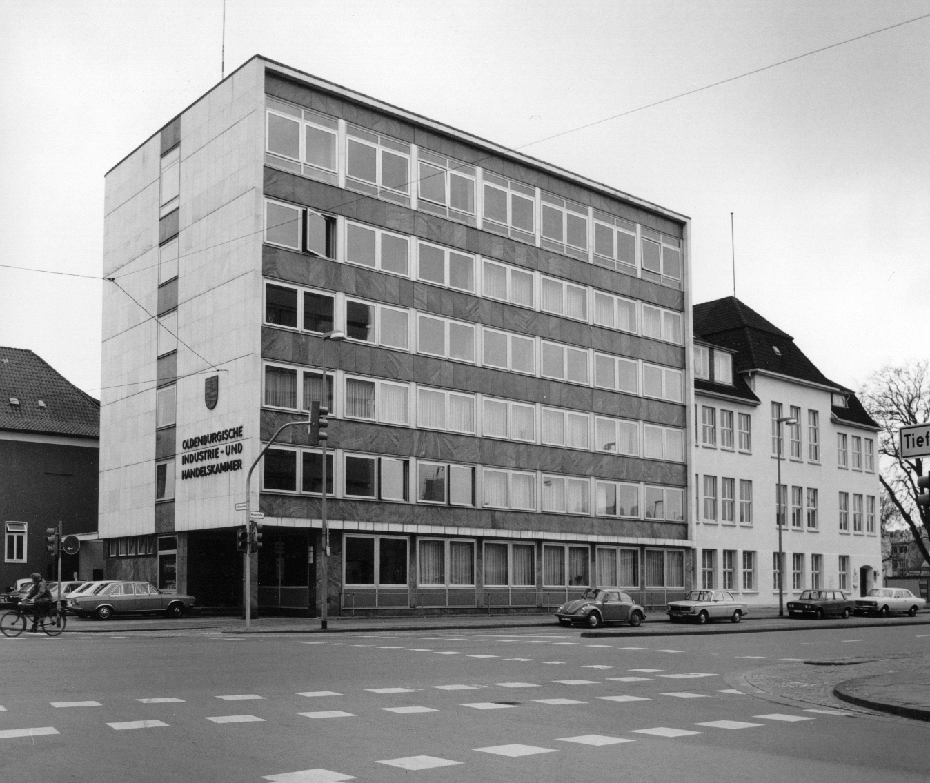 Oldenburgische IHK: Gebäude in den 60er Jahren